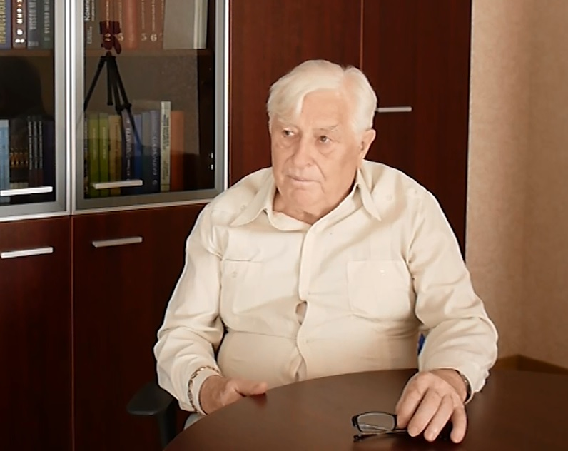 Фото А. С. Капто.